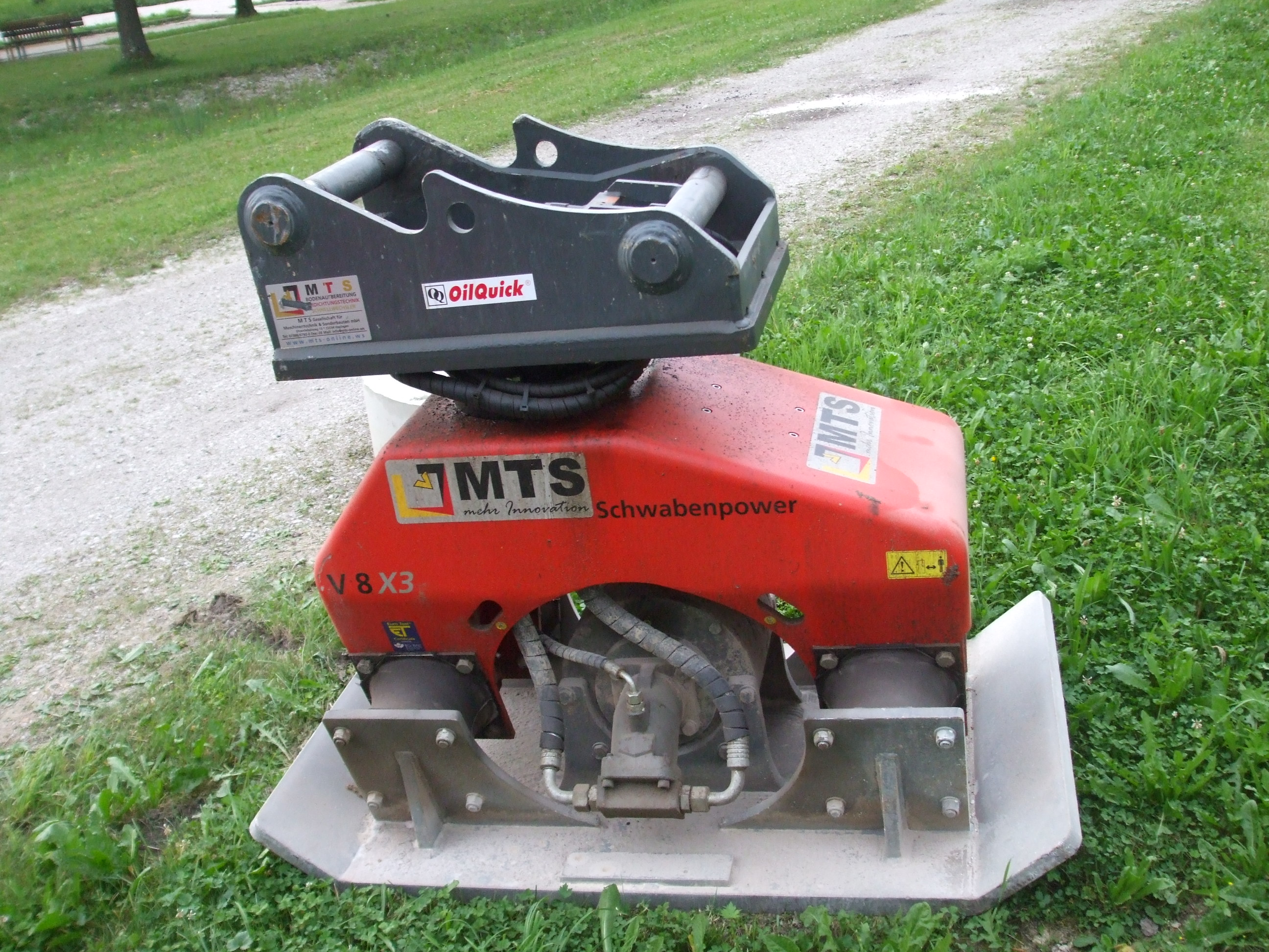 Hydraulisch angetriebener Platten-Rüttler (Bagger-Anbaugerät mit Oil-Quick-Anschluss)